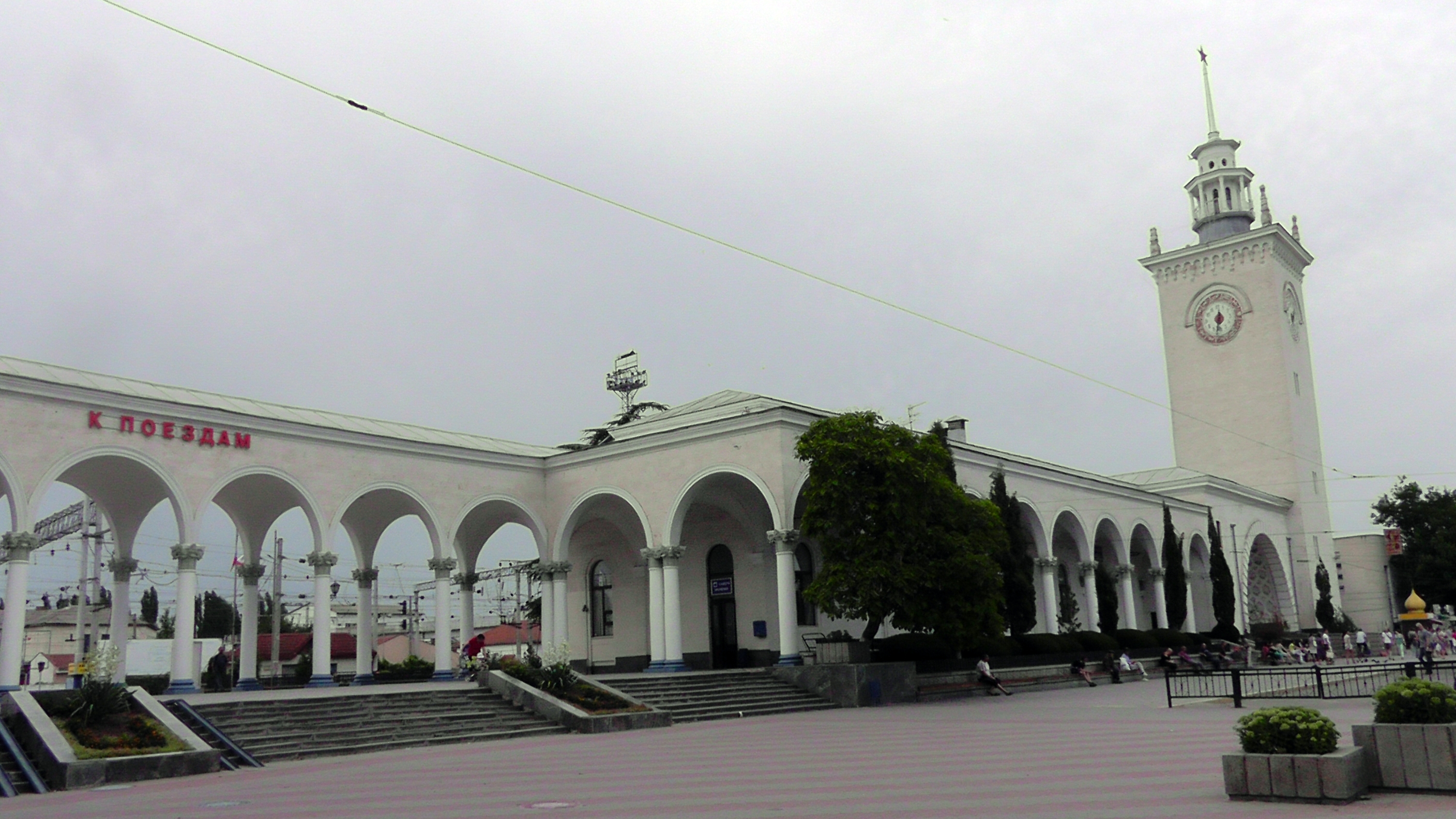 Залізничний вокзал, Сімферополь, пл. Привокзальна, 1, літер «А», «а», «а1», « а5», «л1», «л2», «Л», «н1», "Н "